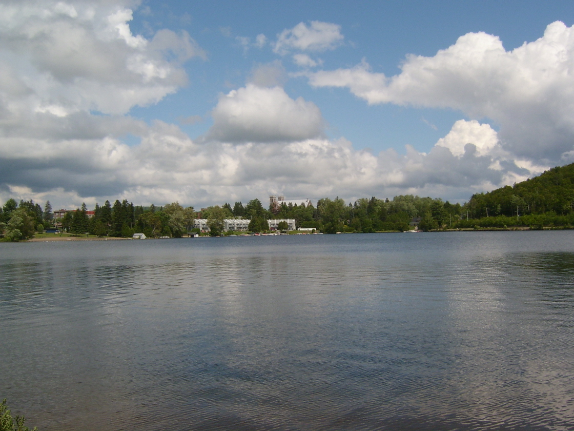 Sainte-Agathe-des-Monts - Québec - Canada